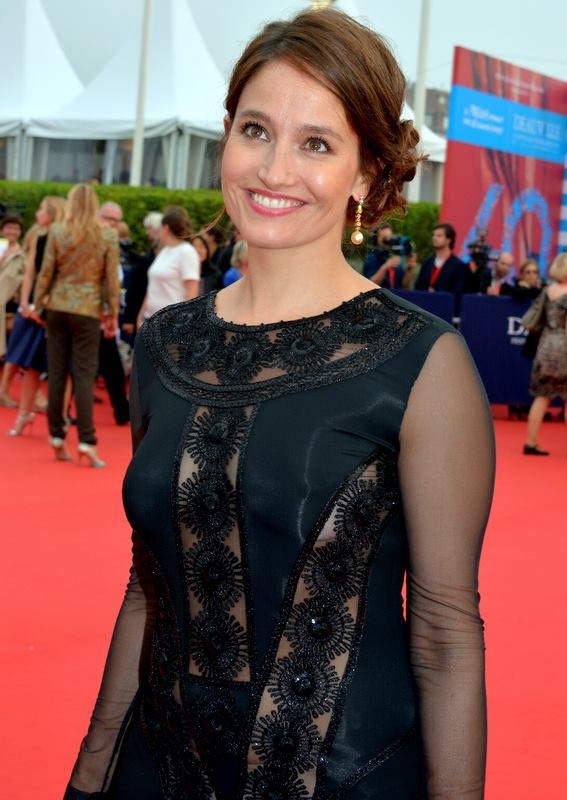 Marie Gillain au festival de Deauville